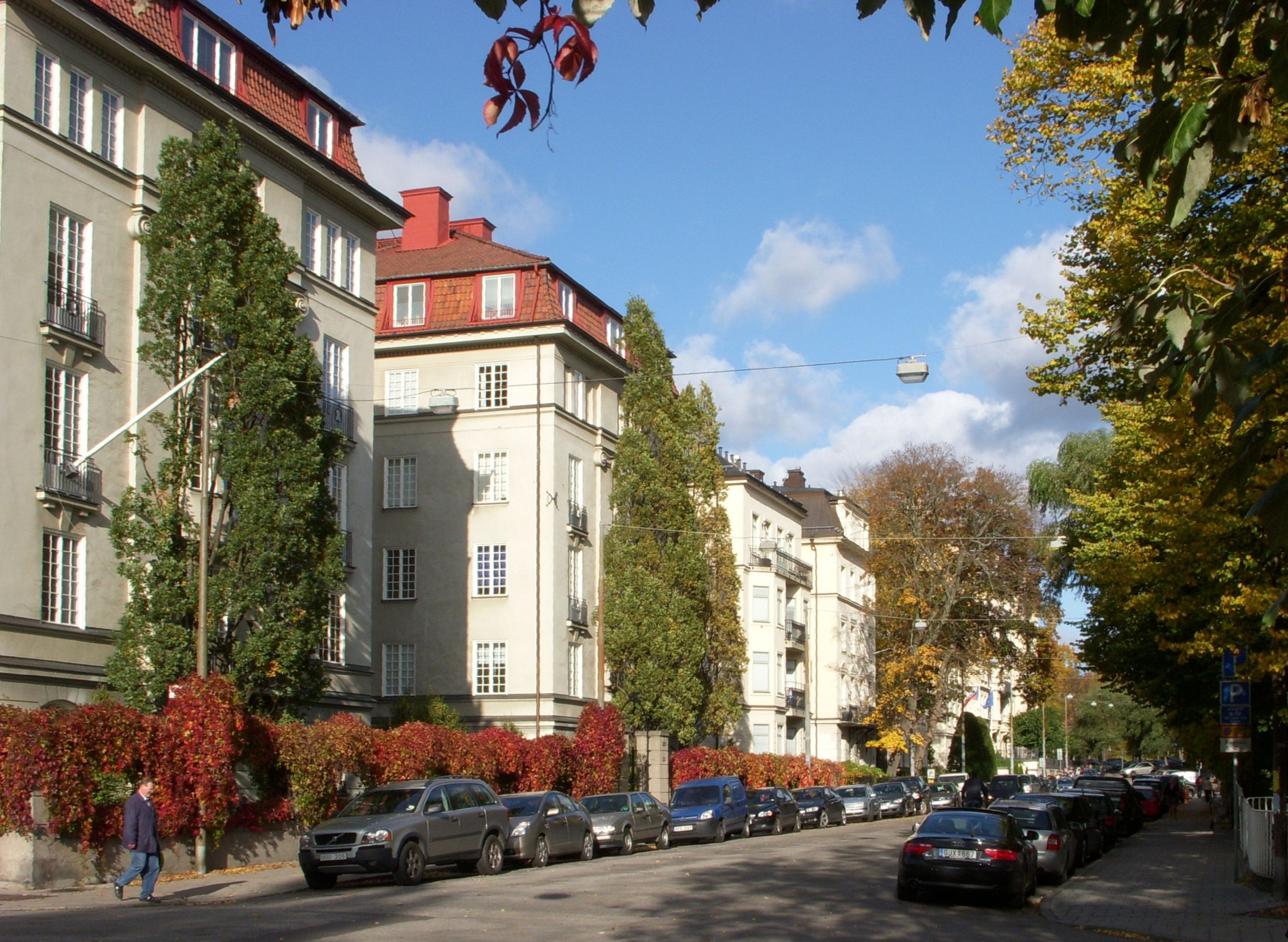 Villagatan i stadsdelen Östermalm, Stockholm